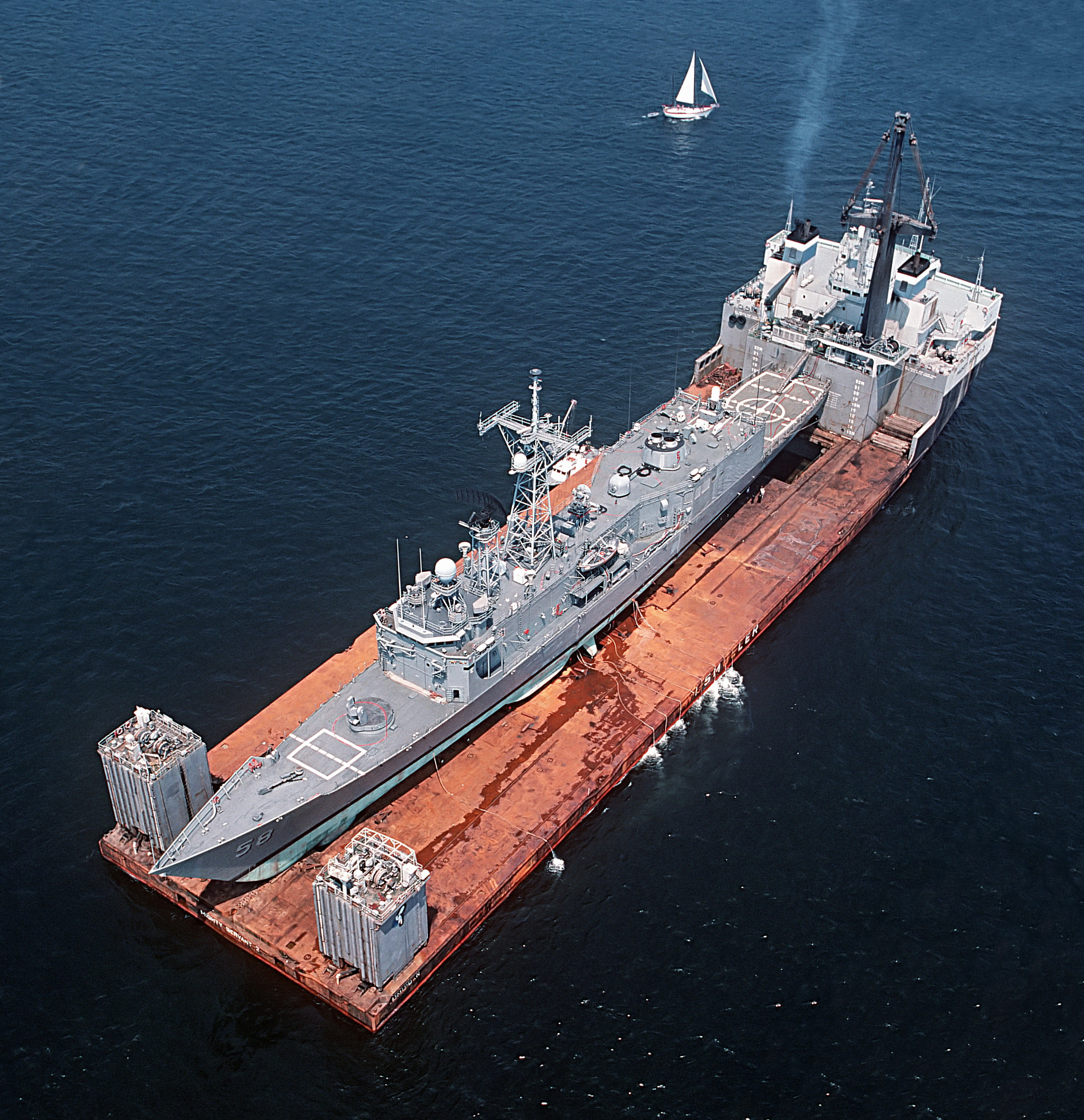 Die Lenkwaffenfregatte USS Samuel B. Roberts wird nach einer Beschädigung von einer Seemine im Persischen Golf auf dem Schiffsträger Mighty Servant 2 nach Newport, Rhode Island zur Reparatur befördert. Information about Mighty Servant 2 may be found at IMO 8130887. A ship can change her name and flag state through time, but the IMO number remains the same through the hull's entire lifetime. Therefore, it's useful to identify a ship through her IMO number.